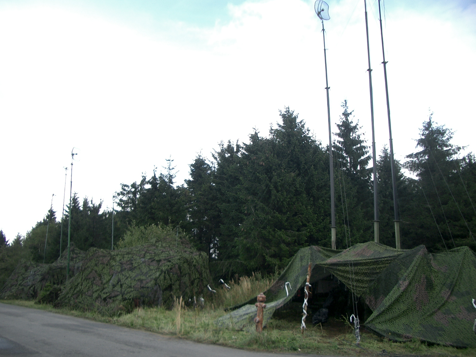 Dansk radiokædecentral (RKÆCT) ved siden af engelsk. Eksempel på brugen af sløringsnet til at camouflere militært kommunikationsudstyr